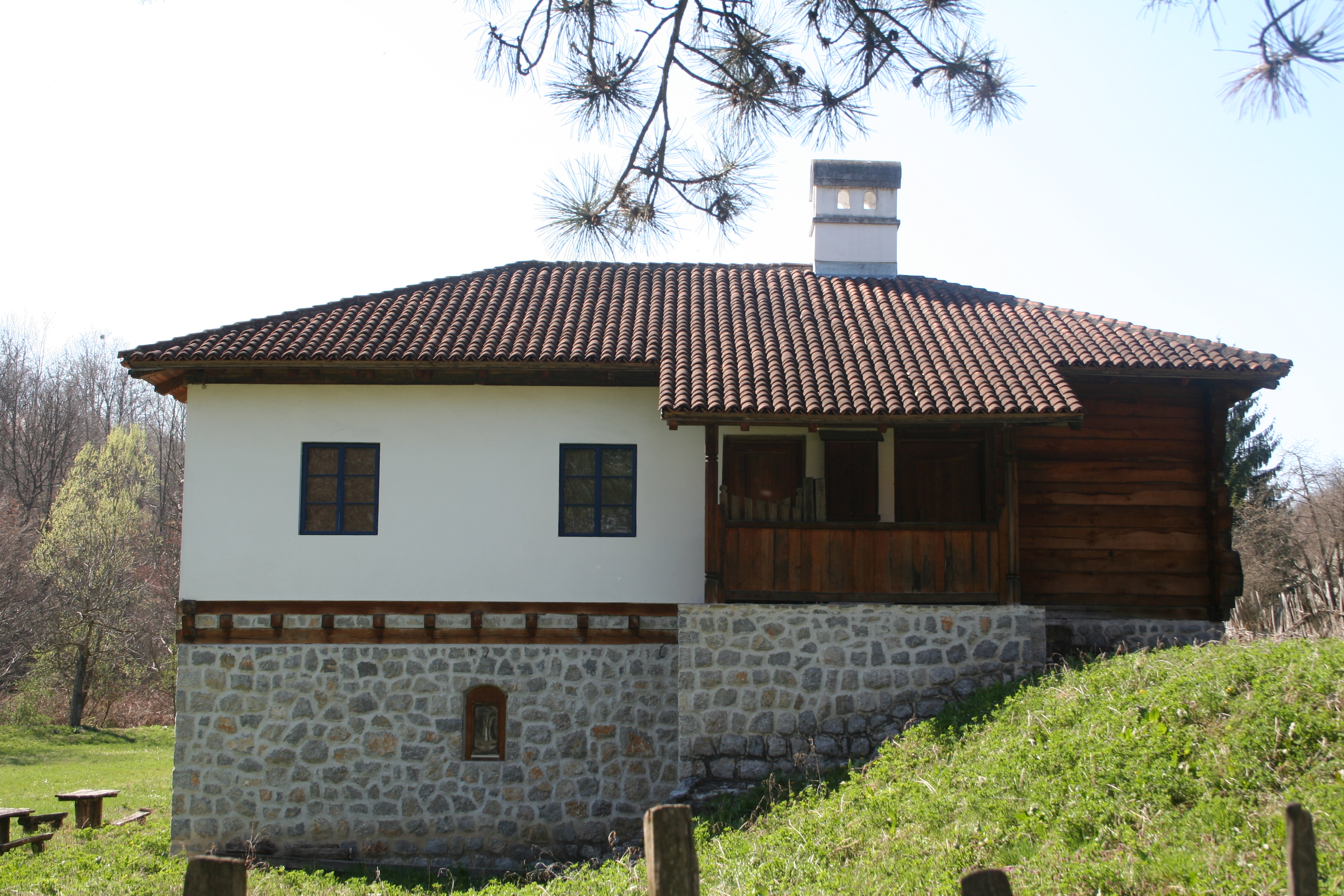 Replika kuće Nenadovića, Brankovina